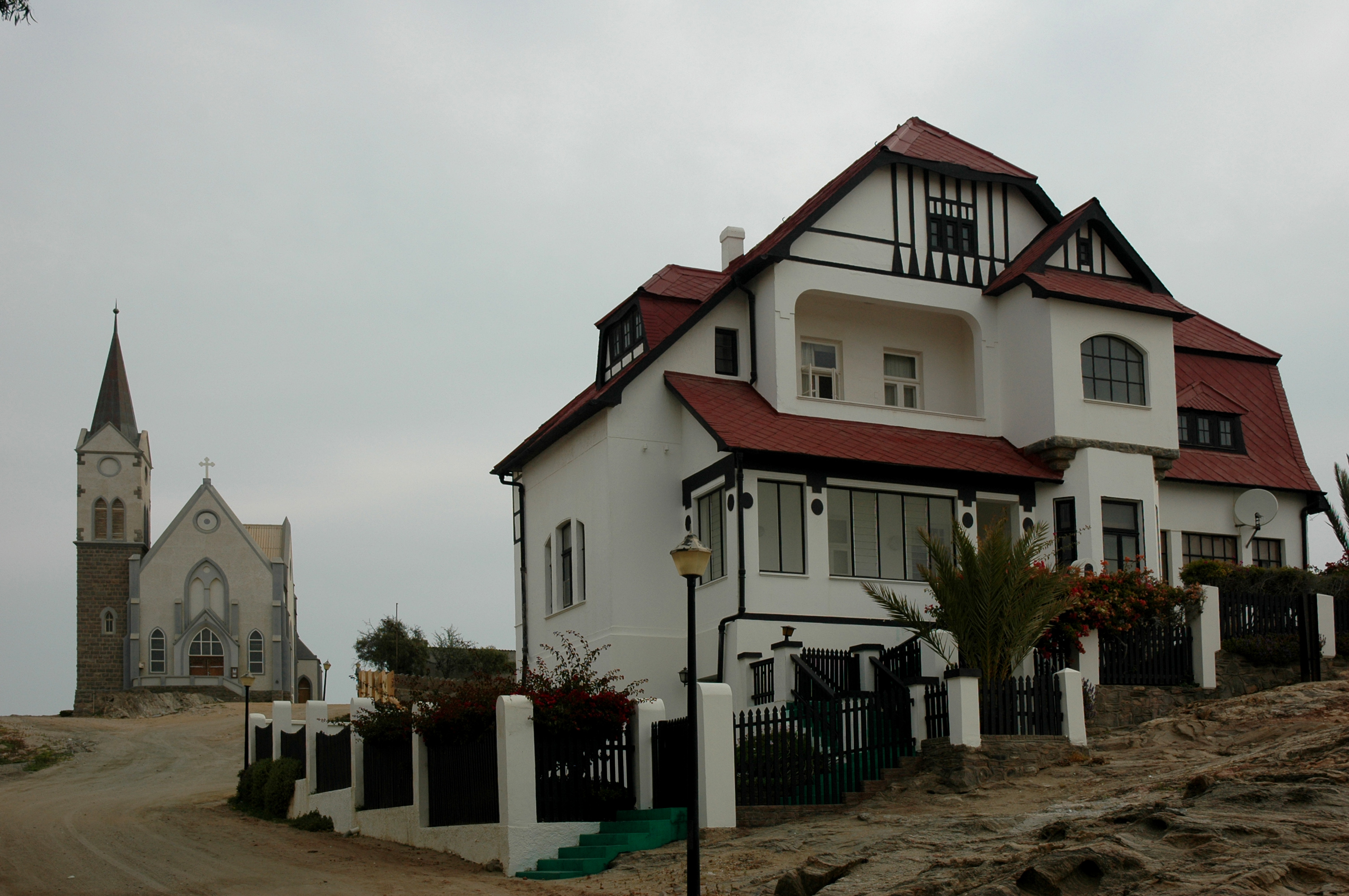 Namibie Luderitz Photographie prise par GIRAUD Patrick